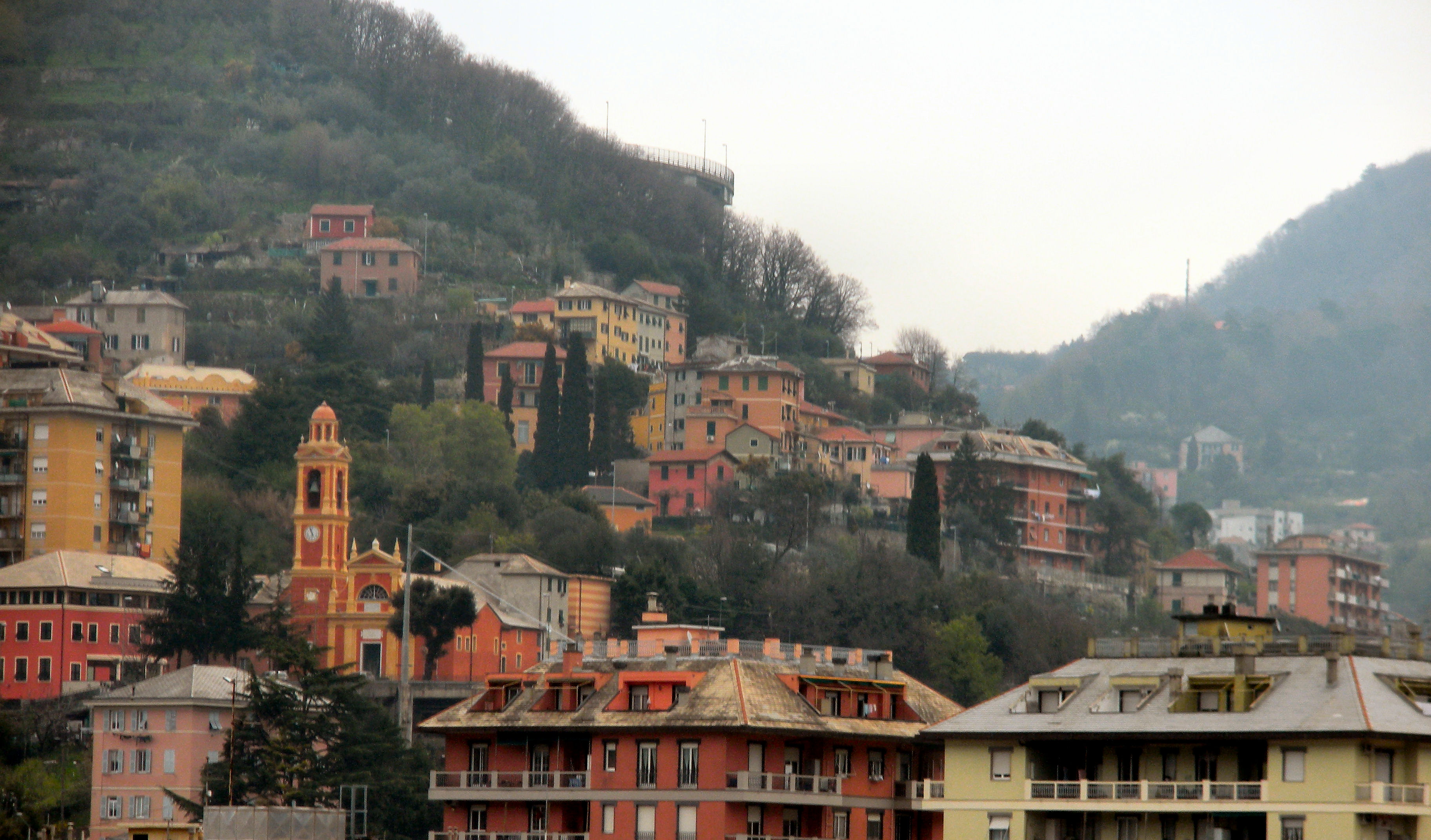 Panorama di Montesignano (Molassana, quartiere di Genova)